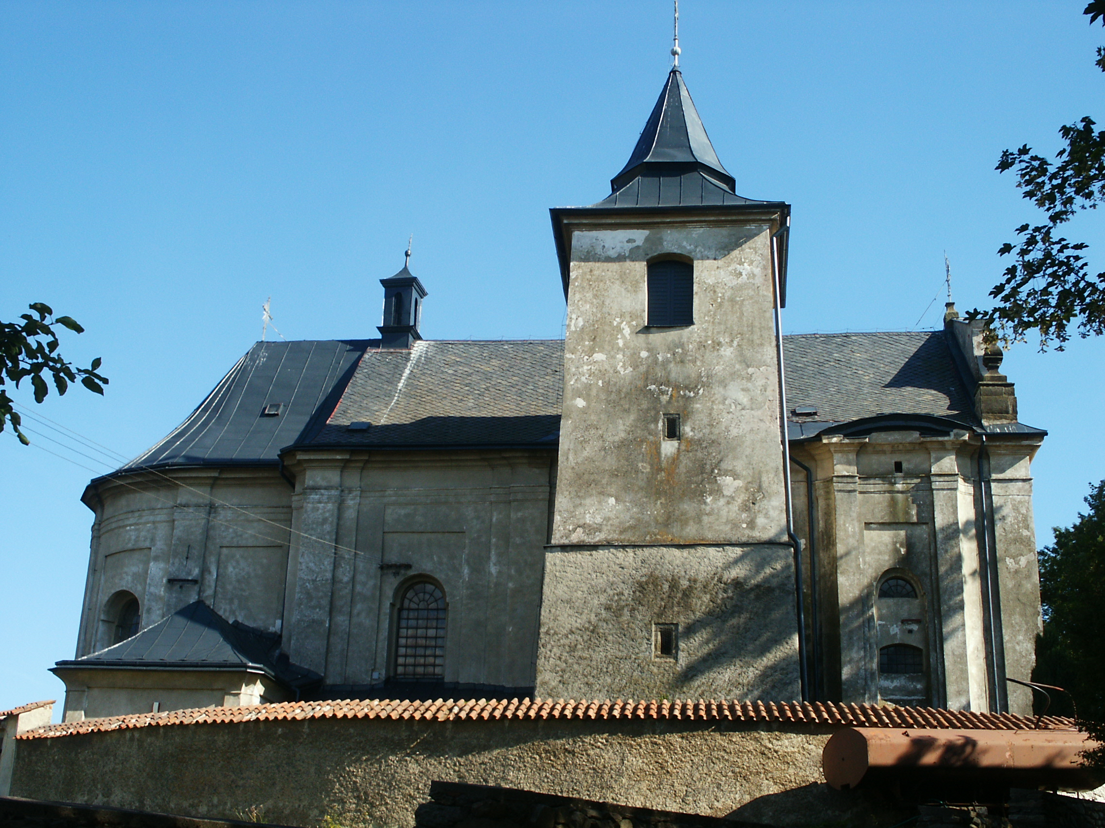 Kostel sv. Michala (Krouna), severovýchodní část obce, Krouna